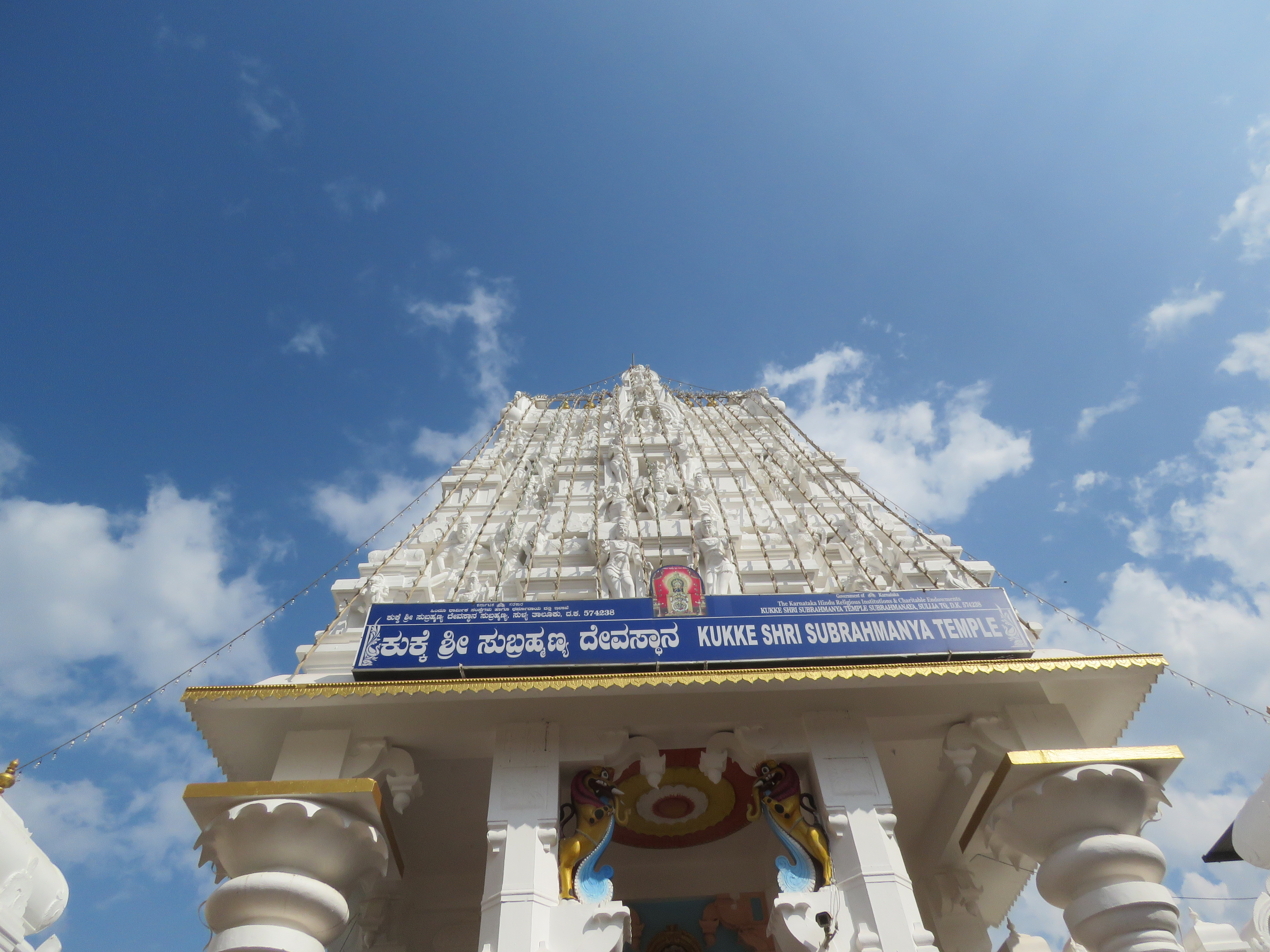 Photos by Vinayaraj